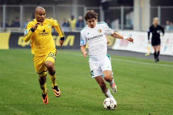 Павло Ребенок під час матчу з харківським Металістом.